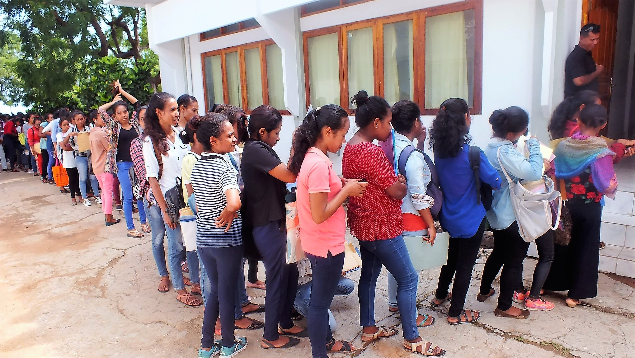 Tetun: SEFOPE KONTINUA REKRUTA KANDIDATU TRABALLADÓR NE’EBÉ ATU BA SERVISU IHA AUSTRALIA. Liquiça- SEFOPE Munisípiu Liquiça iha loron 15 Fevereiru 2019 hahu rekruta kandidatu traballadóres ba iha Programa SWP (Seasonal Worker Program) ne’ebé atu haruka traballadór sira ba servisu iha Australia ho durasaun tempu fulan ne’en. Kandidatu trabaladór ne’ebé ohin hatama dokumentus ho total 309, Feto 101 no Mane 208. Programa ne’e realiza tamba hetan ona kooperasaun entre Governu Repúblika Demokrátika Timor-Leste no Governu Austrália hahu husi governu Da-ne’en no to’o mai iha governu Da-walu sei kontinua nafatin haruka juventude Timor-oan barak ba servisu. Diretóra Munisípiu Liquiça Lucia Correia hateten antes hala’o prosesu rekrutamentu SEFOPE Munisípiu Liquiça halo uluk kartaun evidensia no hato’o ba joven sira hodi prepara sira nia kapasidade liu-liu ba iha Lingua Ingles ne’ebé importante atu bele ko’alia. Nia mós hateten prosesu rekrutamentu ne’e la’o ho disiplina no kondisaun ne’ebé di’ak. Tuir orariu ne’ebé iha Munisipiu Liquiça sei termina prosesu rekrutamentu hatama dokumentus iha 25 Fevereiru Ho mudansa sistema rekrutamentu ne’e joven sira iha munisípiu entusiasmu hodi partisipa iha prosesu ne’e.